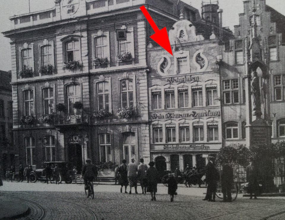 Das Stammhaus auf dem Marktplatz 2